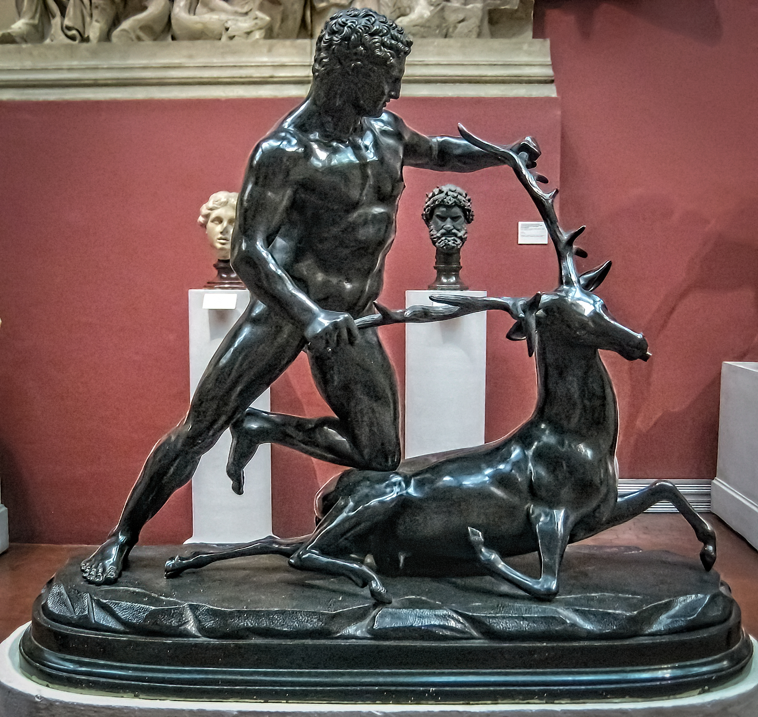 Hercules from the Museo archeologico regionale di Palermo